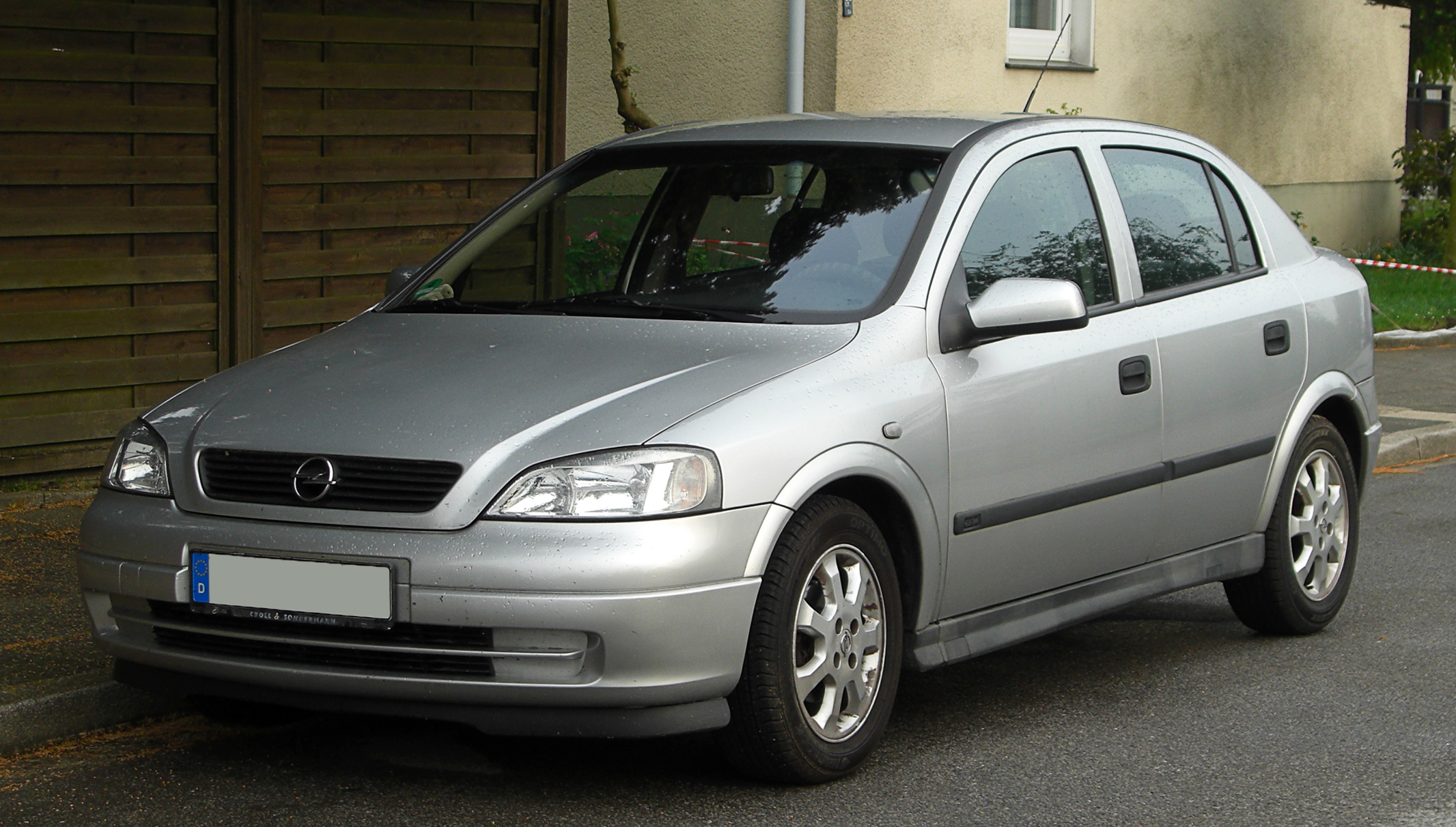 Opel Astra 1.6 16V Edition 2000 (G)